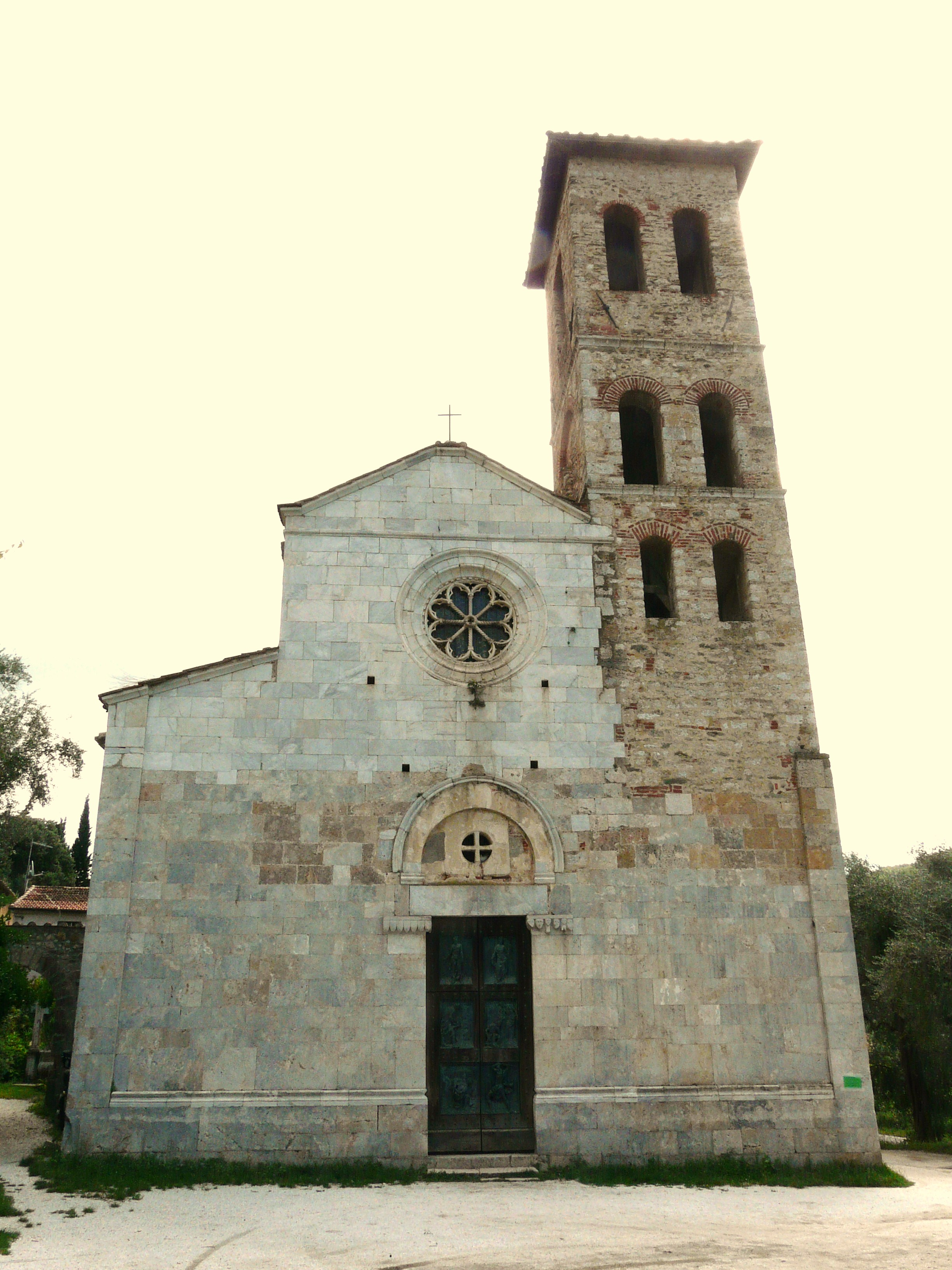 Pieve di San Giovanni e Santa Felicita, Valdicastello Carducci, Pietrasanta, Toscana, Italia